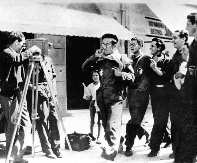 Gonzalo Menéndez Pidal (a la izquierda de la imagen) graba a Federico García Lorca y otros miembros de La Barraca (con el uniforme de la compañía, mono azul con la insignia diseñada por Benjamín Palencia) en la Calle Capitán Galán (hoy Calle Príncipe) de Vigo, en agosto de 1932.